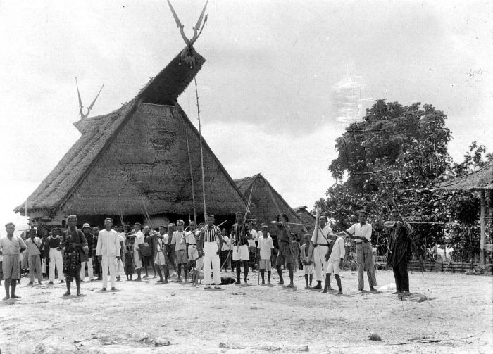 Negatief. Bewoners van de kampong Sangliat Dol op het eiland Jamdena, een van de Tanimbar-eilanden